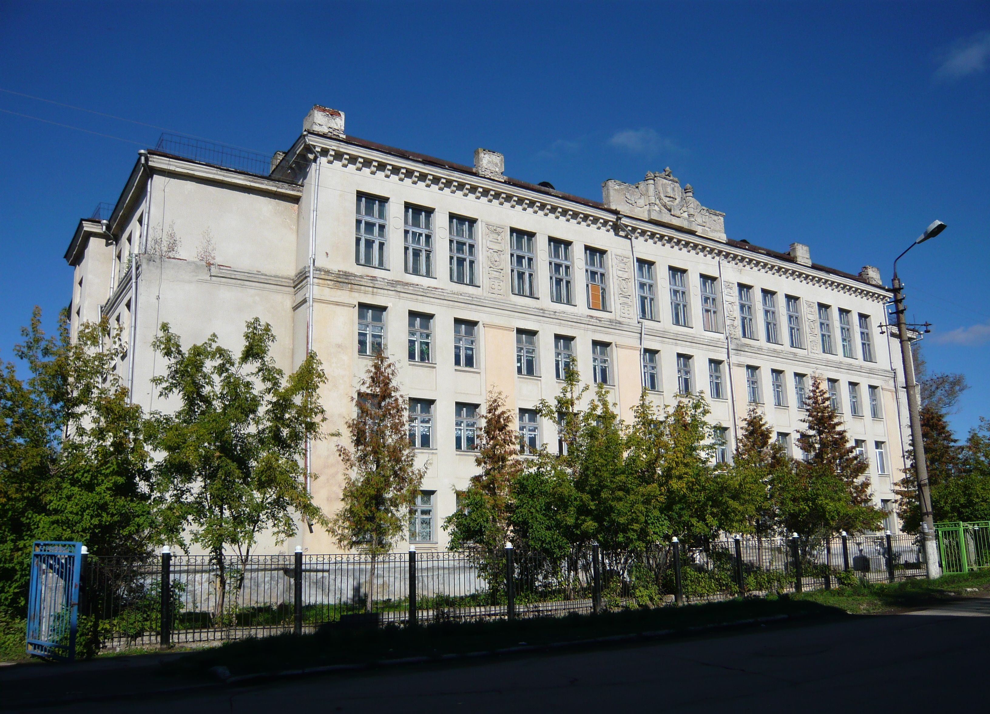 г. Ясногорск, Тульская обл. МОУ "Средняя общеобразовательная школа №1"